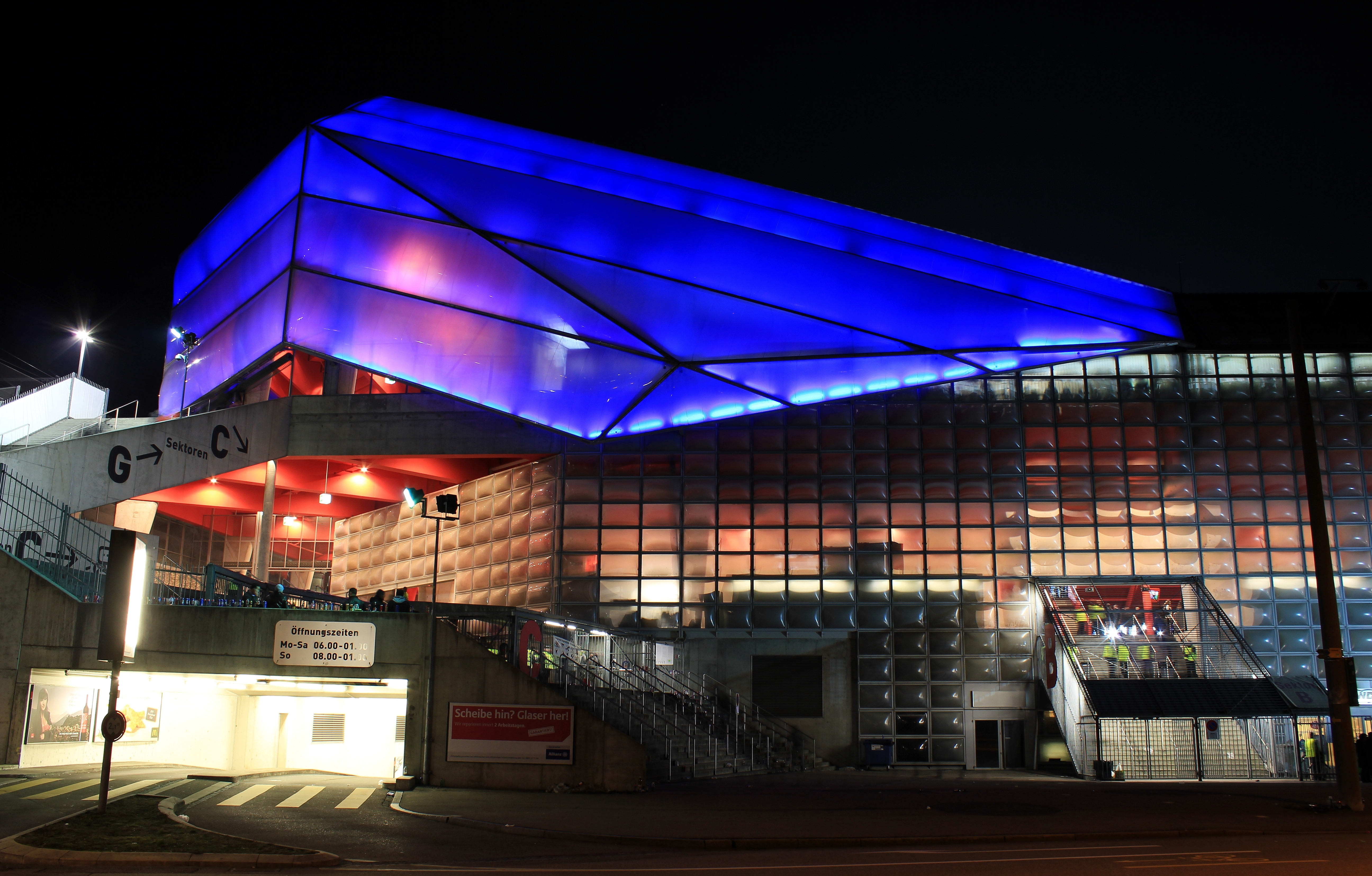 Basel, St. Jakob-Park.